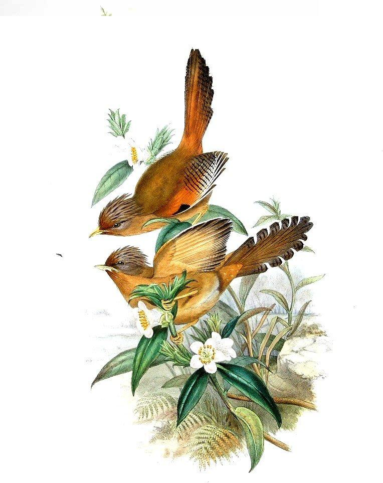 Actinodure d'Egerton